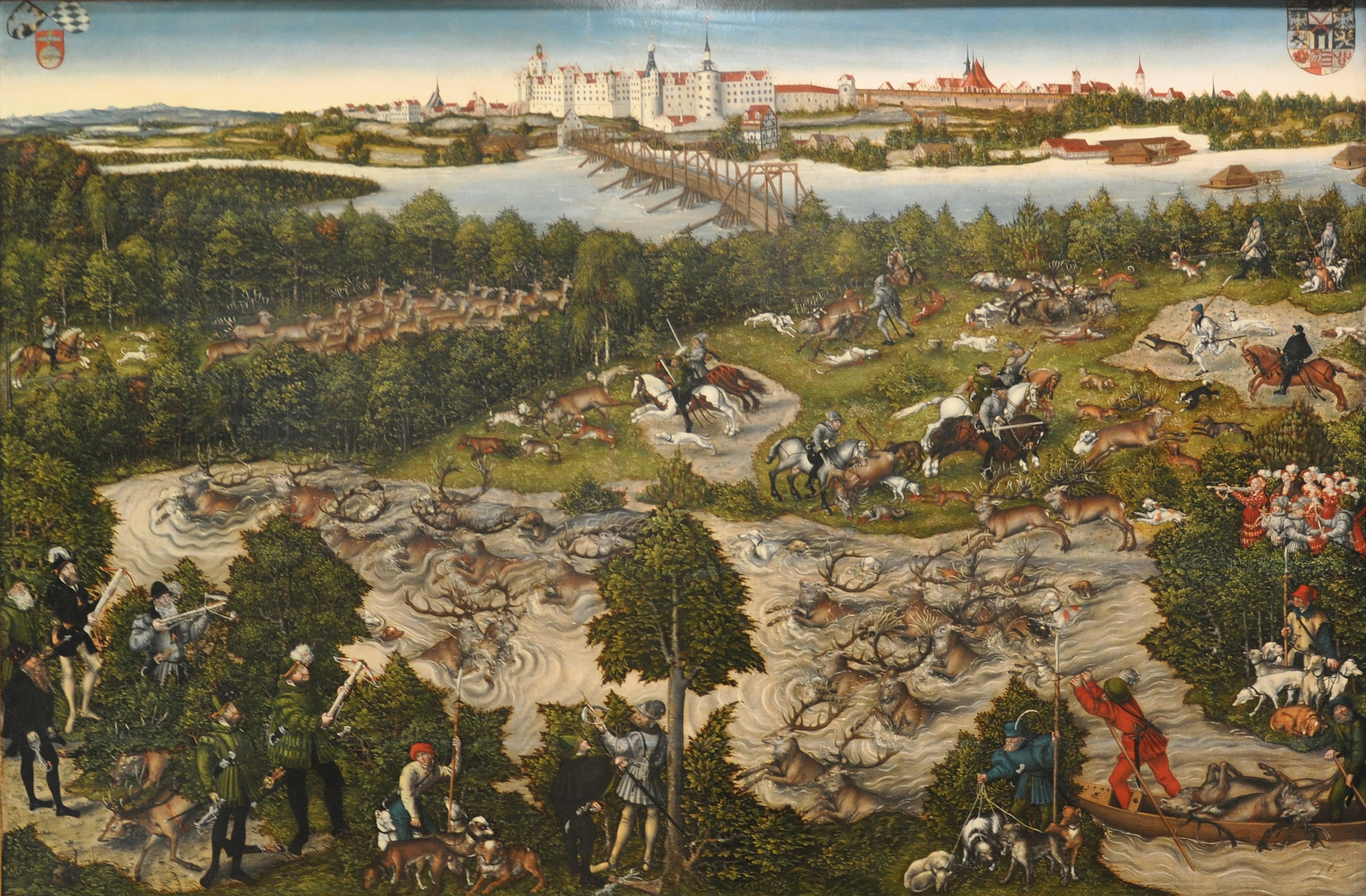 Hirschjagd des Kurfürsten Johann Friedrich I. von Sachsen zu Ehren Kaiser Karl V.All persons shown: Elector John Frederick, son of John of Saxony and Emperor Charles V., son of Philip of Habsburg